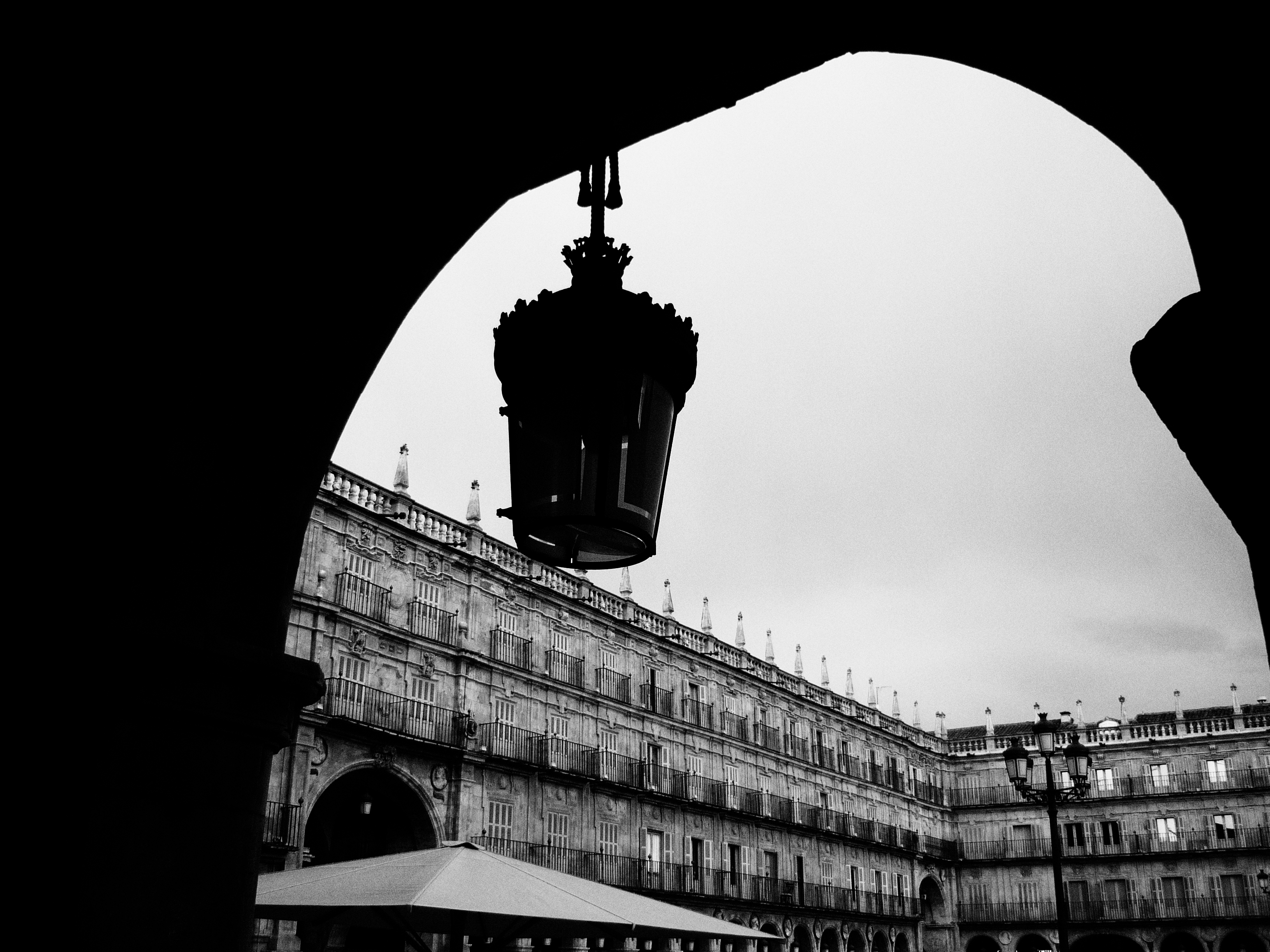 Plaza Mayor de Salamanca, España. 2008.